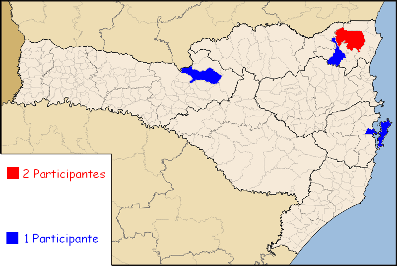 Mapa das cidades participantes do Campeonato Catarinense de Futebol Feminino 2012